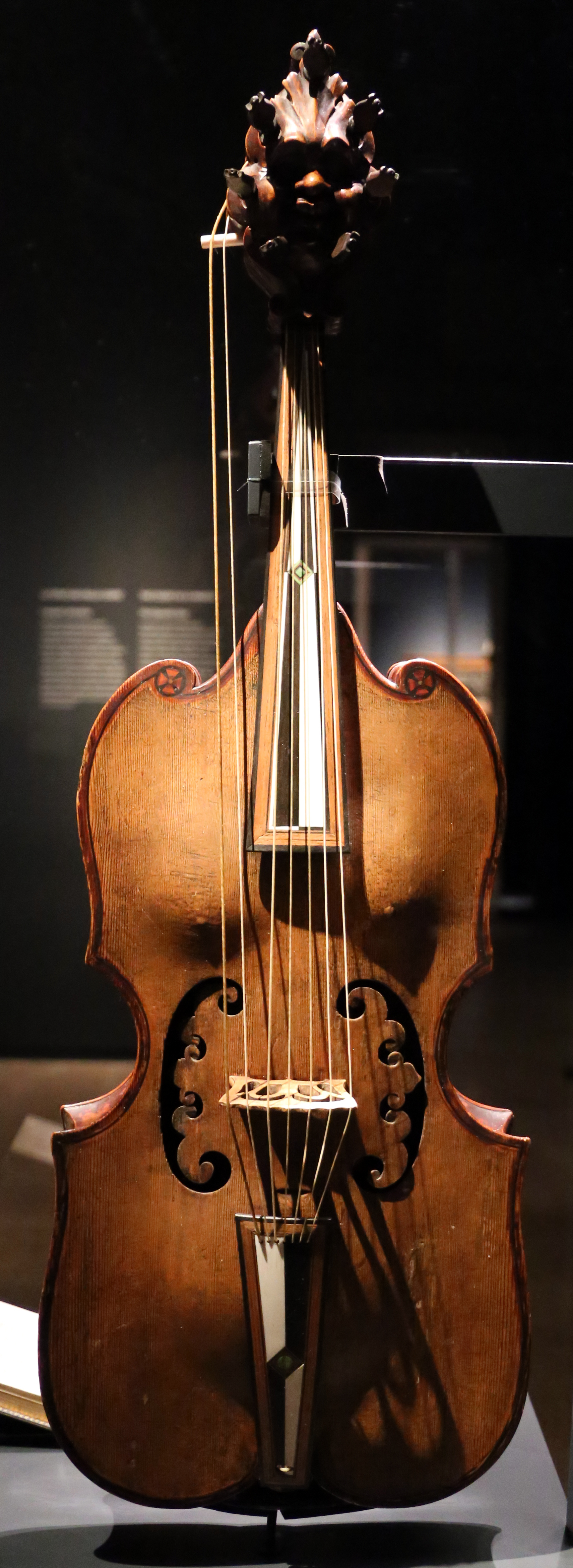 Palazzo dei Diamanti (Ferrara) This is a photo of a monument which is part of cultural heritage of Italy.